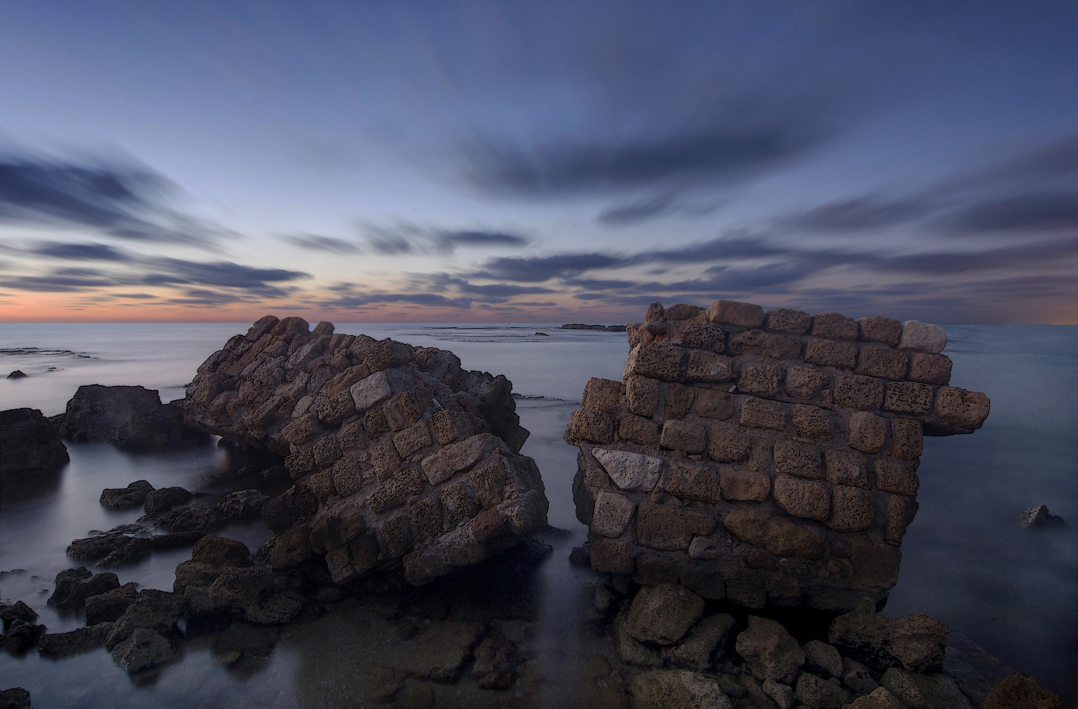 קיסריה היא עיר נמל שהוקמה בשנים 13-25 של לפנה"ס. היא שימשה כבירת ארץ ישראל בתקופה הרומית, ונקראה על שם אוגוסטוס קיסר. כיום העיר העתיקה היא גן לאומי ולידה הוקמה קיסריה המודרנית.